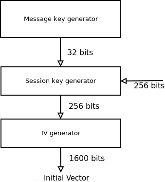 Блок-схема PALS1